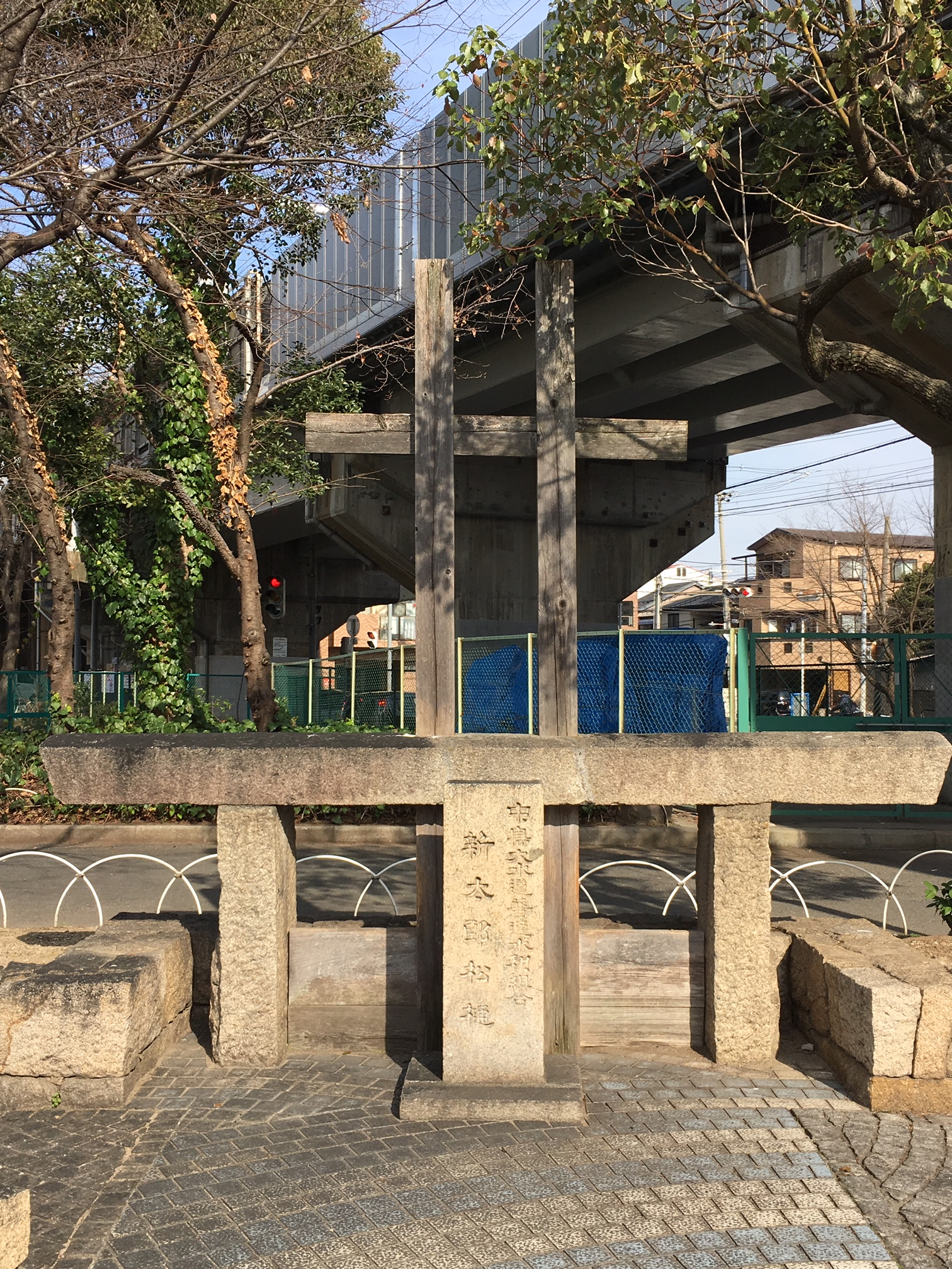 中島大水道跡碑